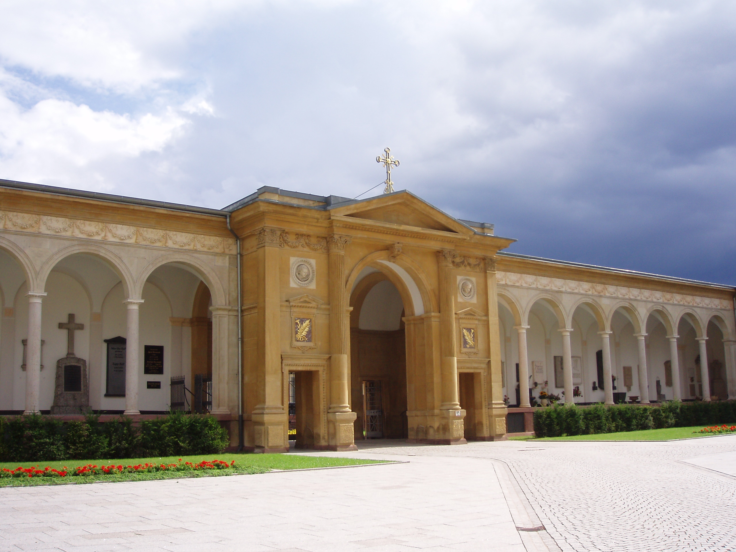 Campo Santo des Karlsruher Hauptfriedhofs 1874-76 nach Plänen von Josef Durm